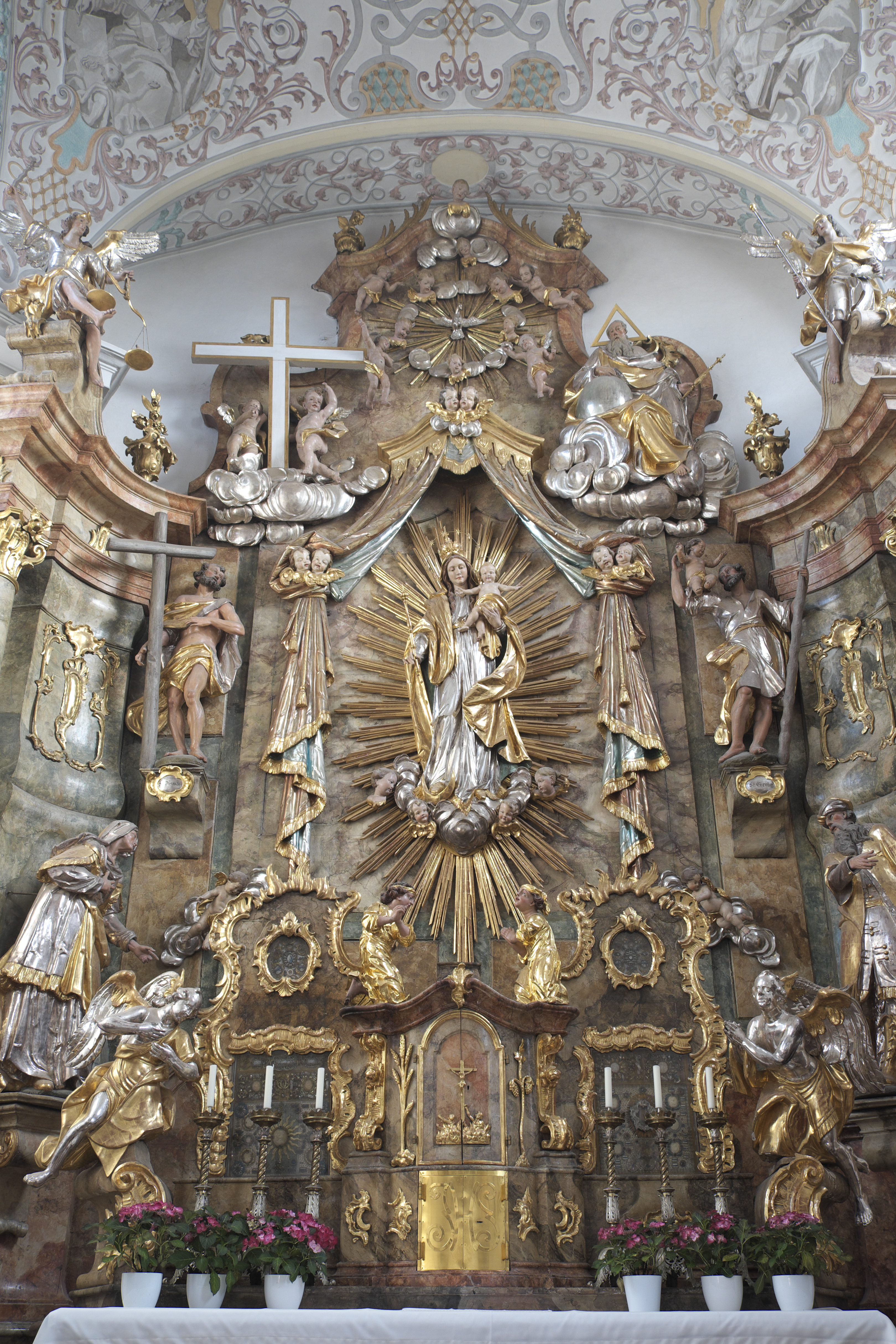 Katholische Pfarrkirche St. Johannes Baptist in Bergkirchen im Landkreis Dachau (Bayern/Deutschland), Hauptaltar